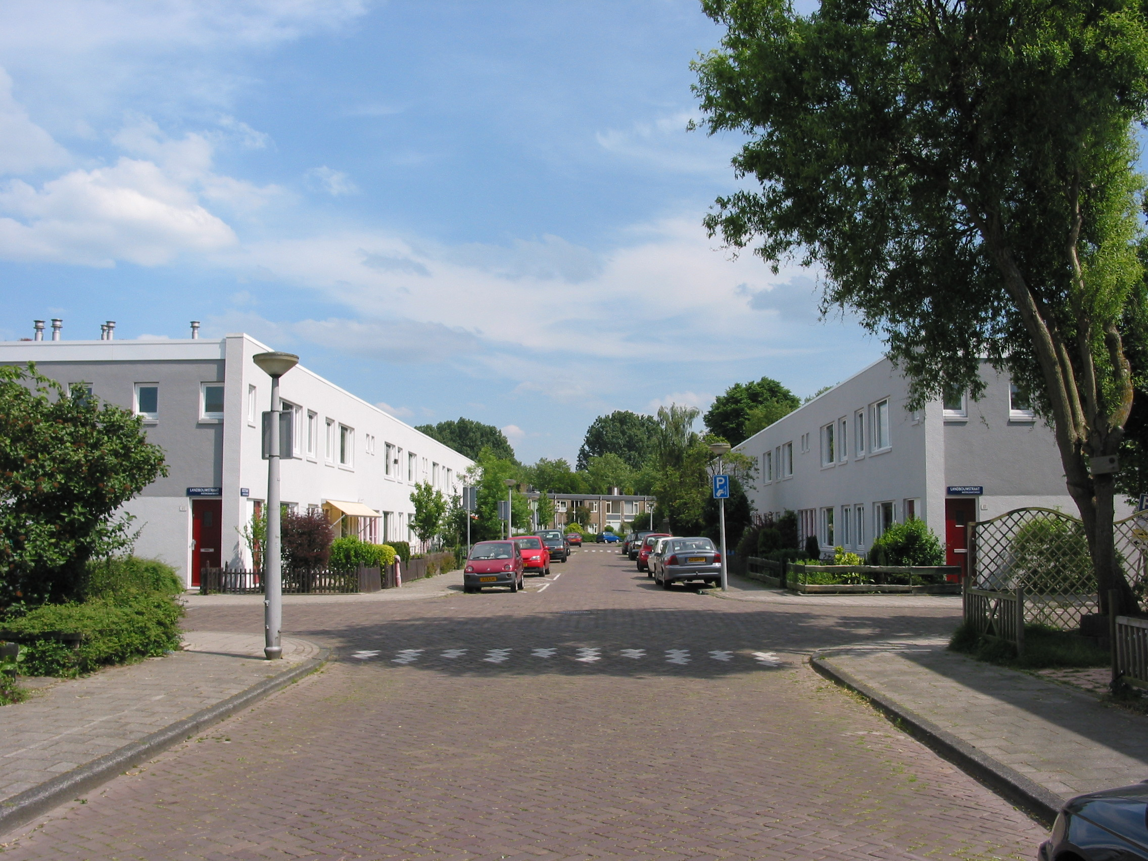 Hoek Oogststraat/Landbouwstraat met huizen van architect Hermann Friedrich Mertens, Betondorp, Amsterdam.